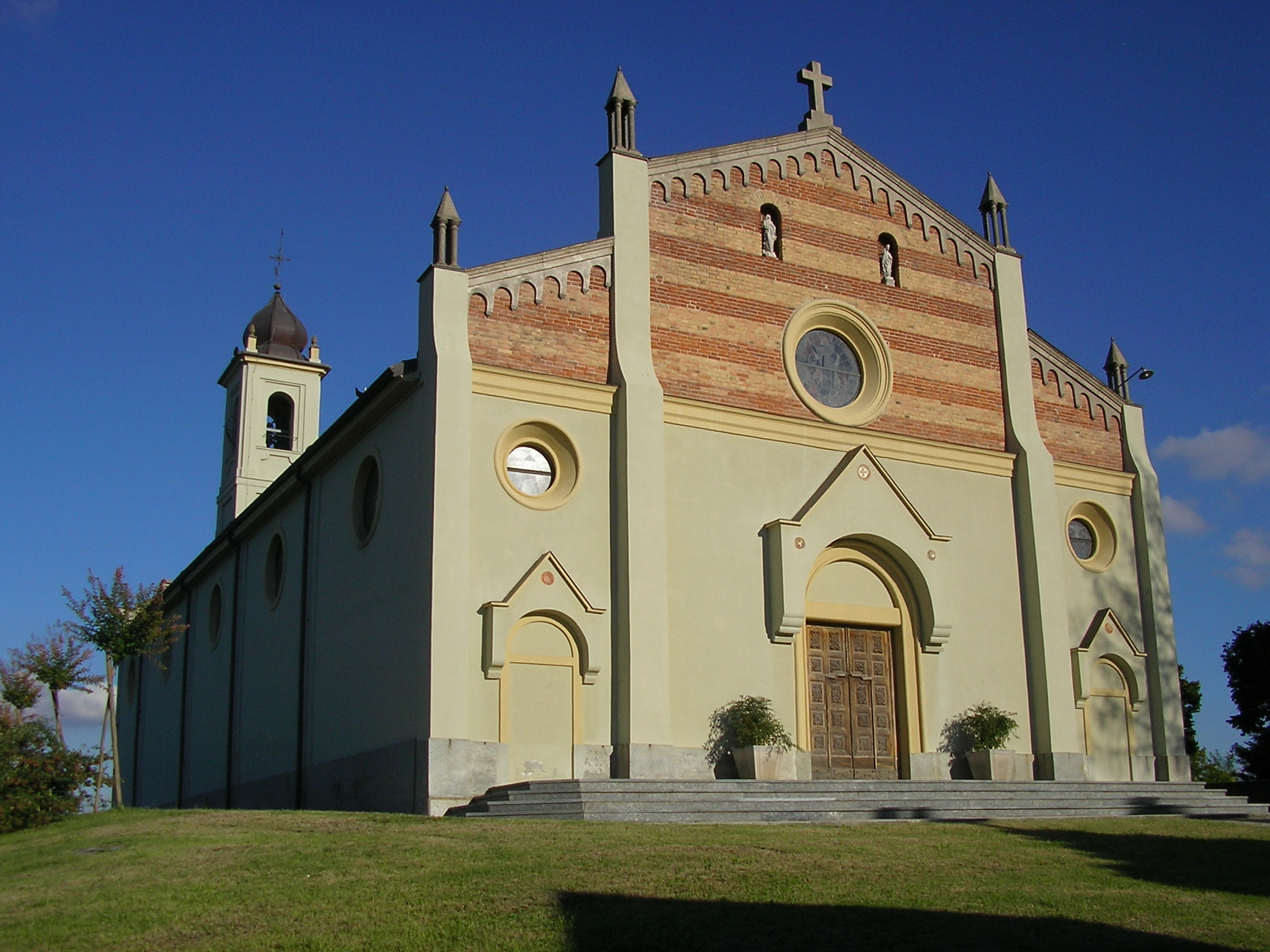 Chiesa parrocchiale a Coniolo Alto